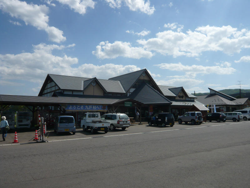 道の駅おりつめ